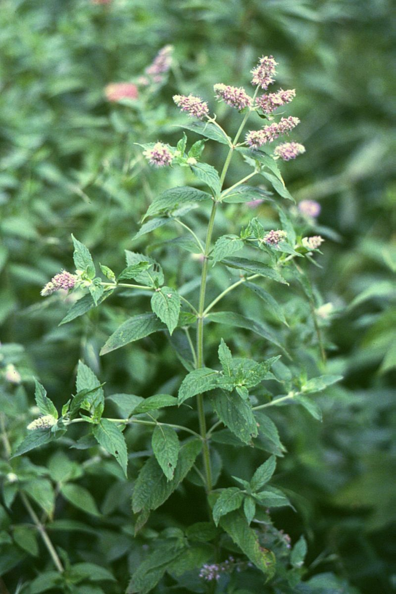 Ross-Minze (Mentha longifolia), Lippenblütler (Lamiaceae) - Österreich/Austria/Autriche: Niederösterreich, Erlauftal E Gaming, unter Nestelberg